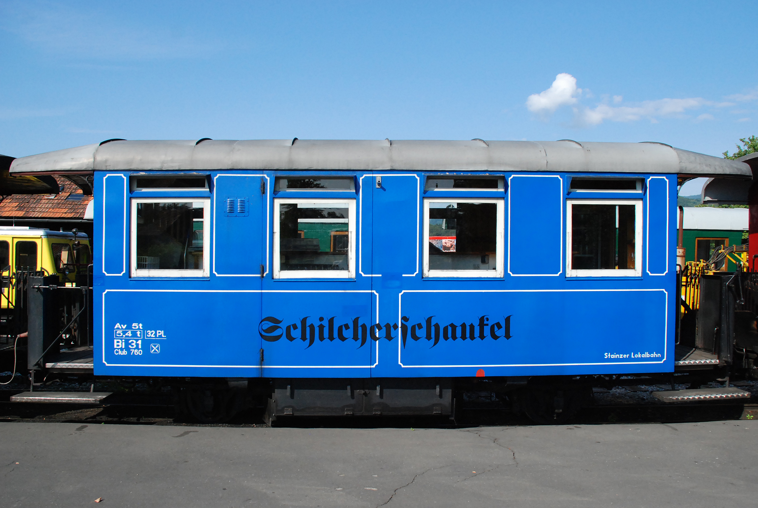 Flascherlzug: touristische Nutzung der Schmalspur-Eisenbahnlinie zwischen Stainz und Preding-Wieselsdorf in der Steiermark, Österreich. Der Zug trägt seinen Namen nach den Fahrgästen, die in den Jahren um 1920/30 zum Urinbeschauer Johann Reinbacher ("Höllerhansl") in Marhof bei Stainz reisten und diese Bahnlinie benutzen. Die Schilcherschaukel ist ein Buffetwagen, der nach dem Schilcher, einem Wein der Umgebung (gekeltert aus der Traube "Blauer Wildbacher") benannt ist.